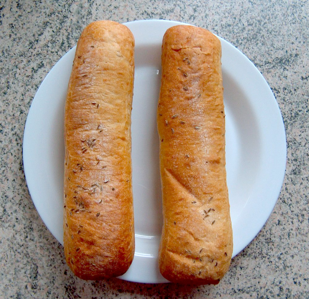 schwäbische Seele, vermutlich aus Weizenmehl